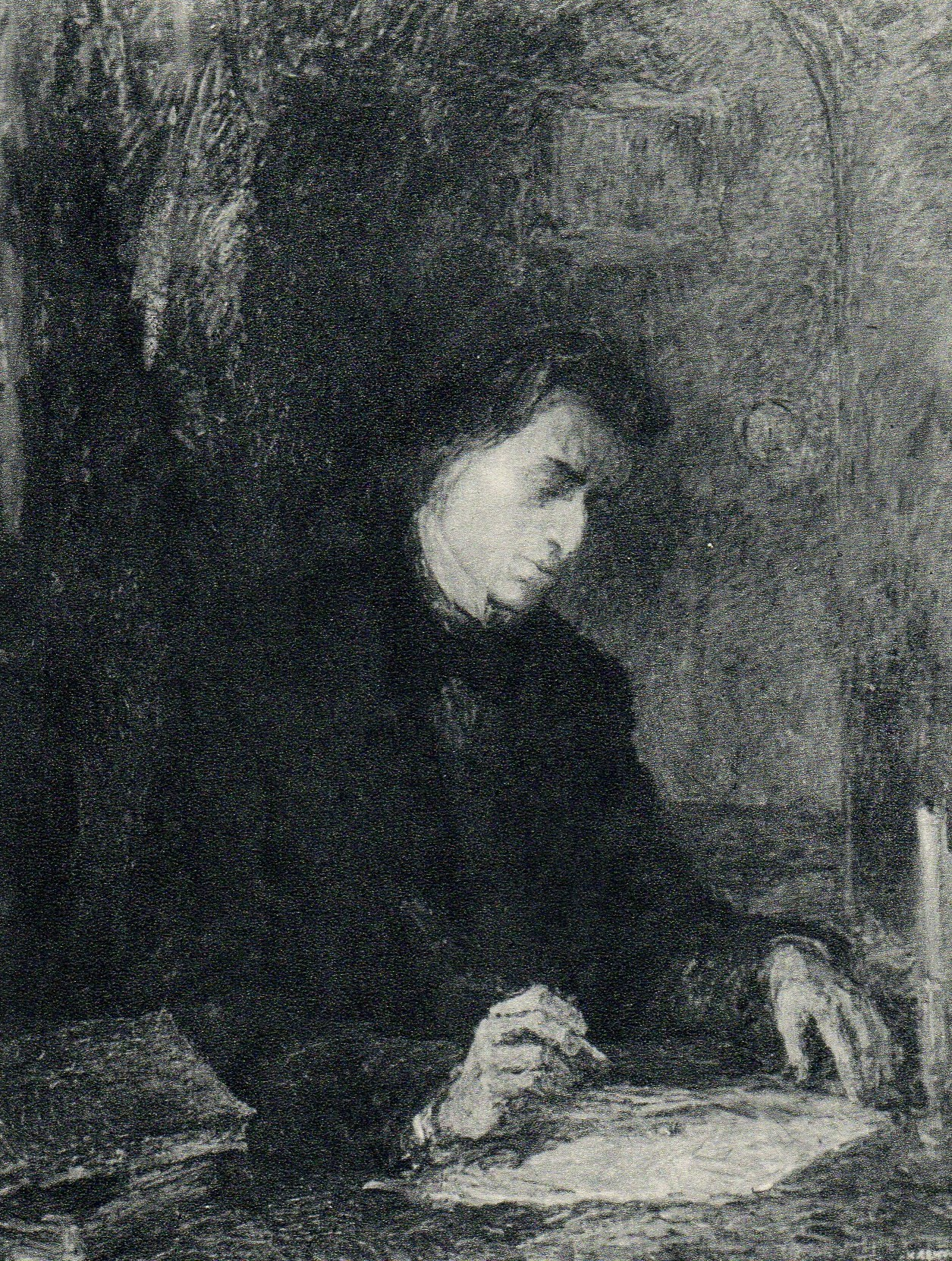 Krystyna Cękalska, Portret Chopina. 1954r.